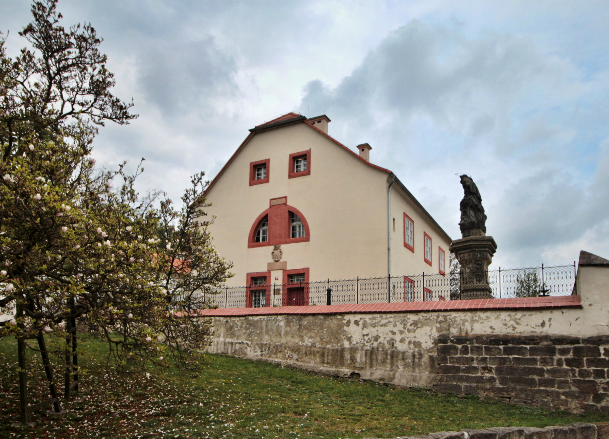 Mimoňský špitál, dnes Městské muzeum v Mimoni